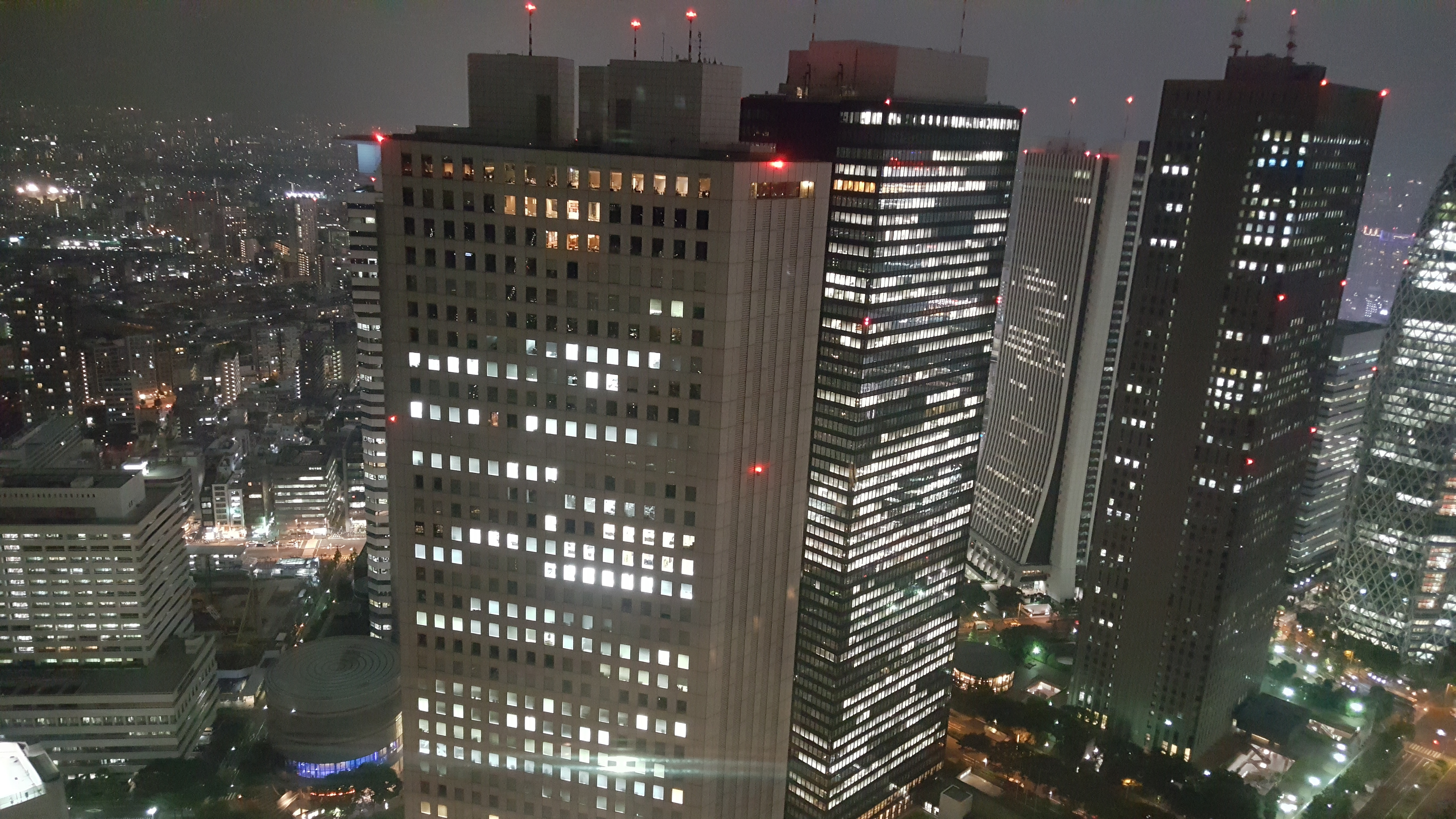 2016년 도쿄도청에서 바라본 도쿄의 야경